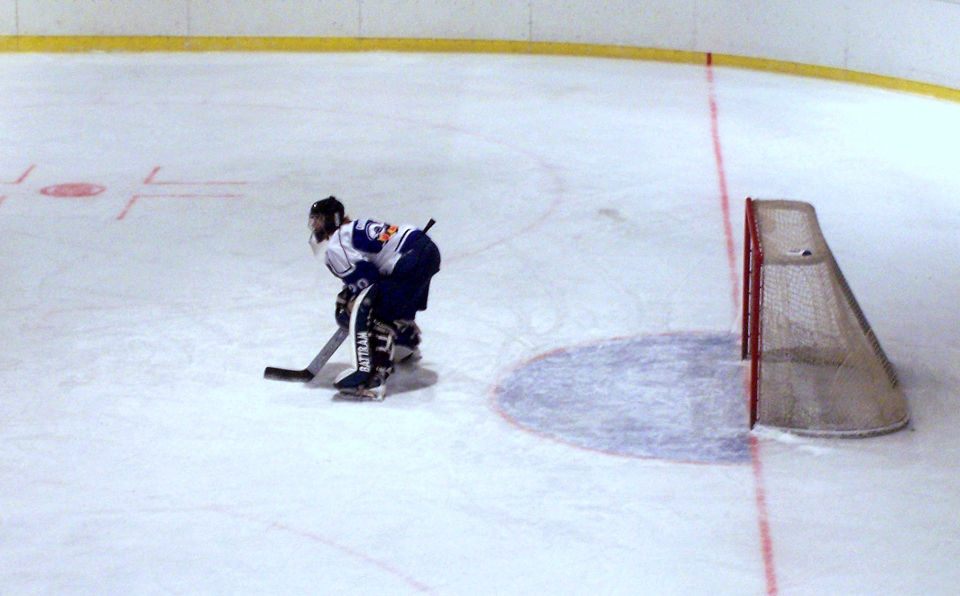 Przemysław Odrobny podczas meczu KH Sanok - Stoczniowiec Gdańsk 21.03.2006